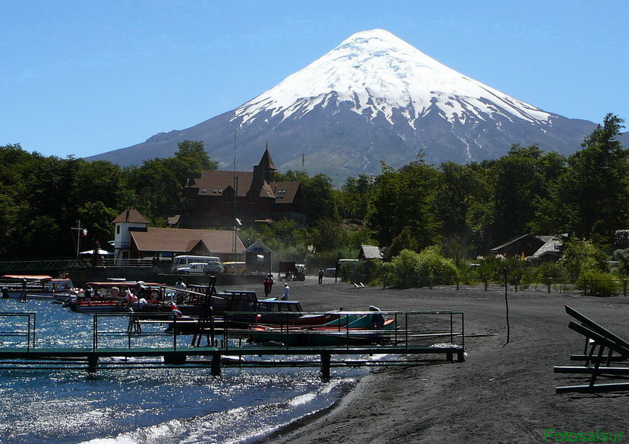 Volcán Osorno from Petrohué, Chile